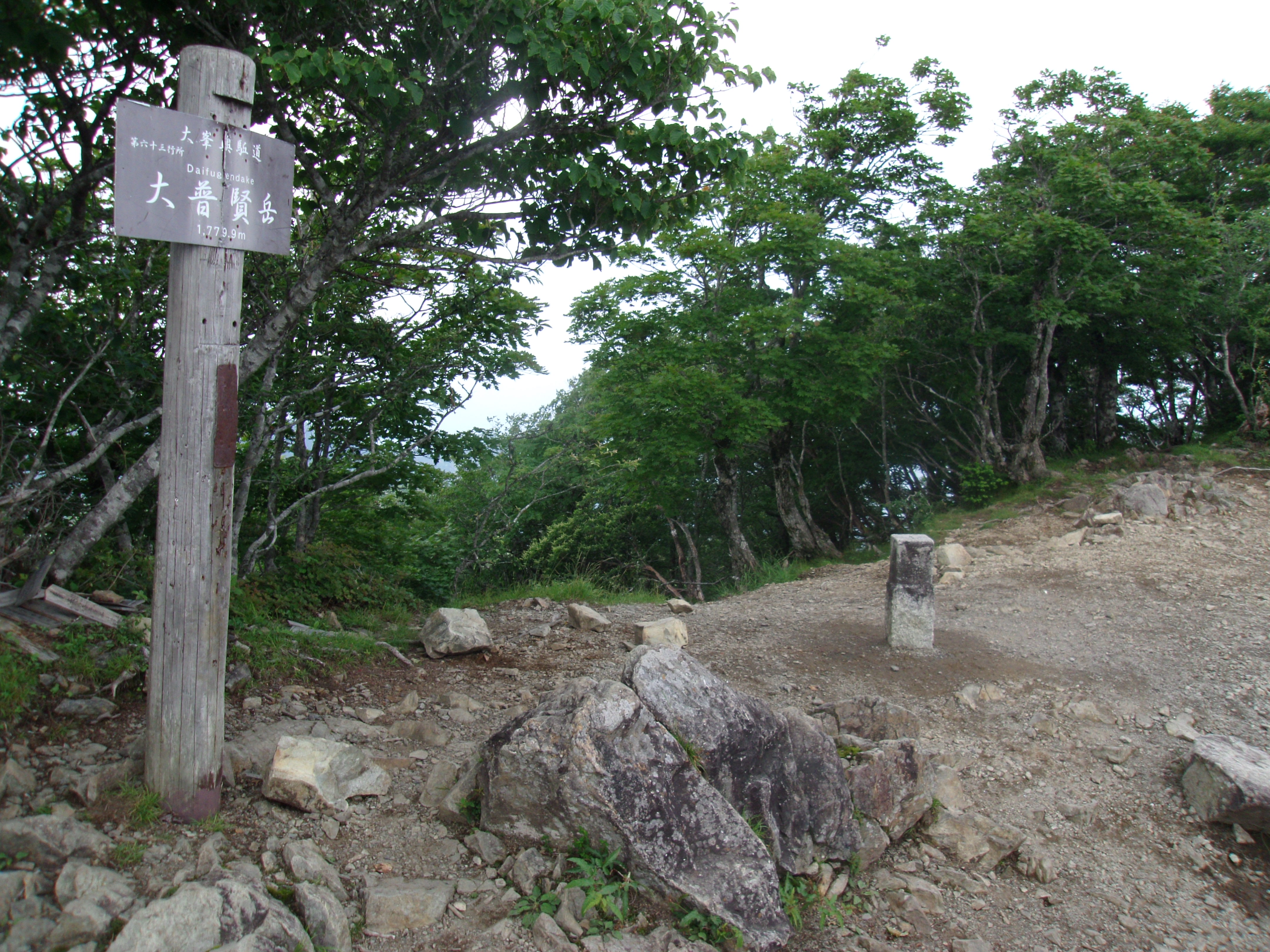 大峯奥駈道第63靡「大普賢岳」山頂